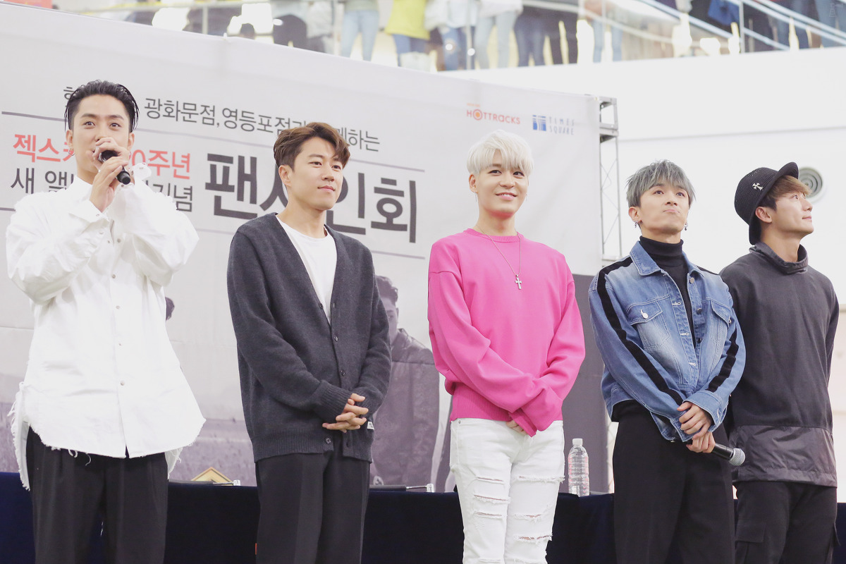 170504 젝스키스 팬사인회 은지원 이재진 김재덕 강성훈 장수원 출처